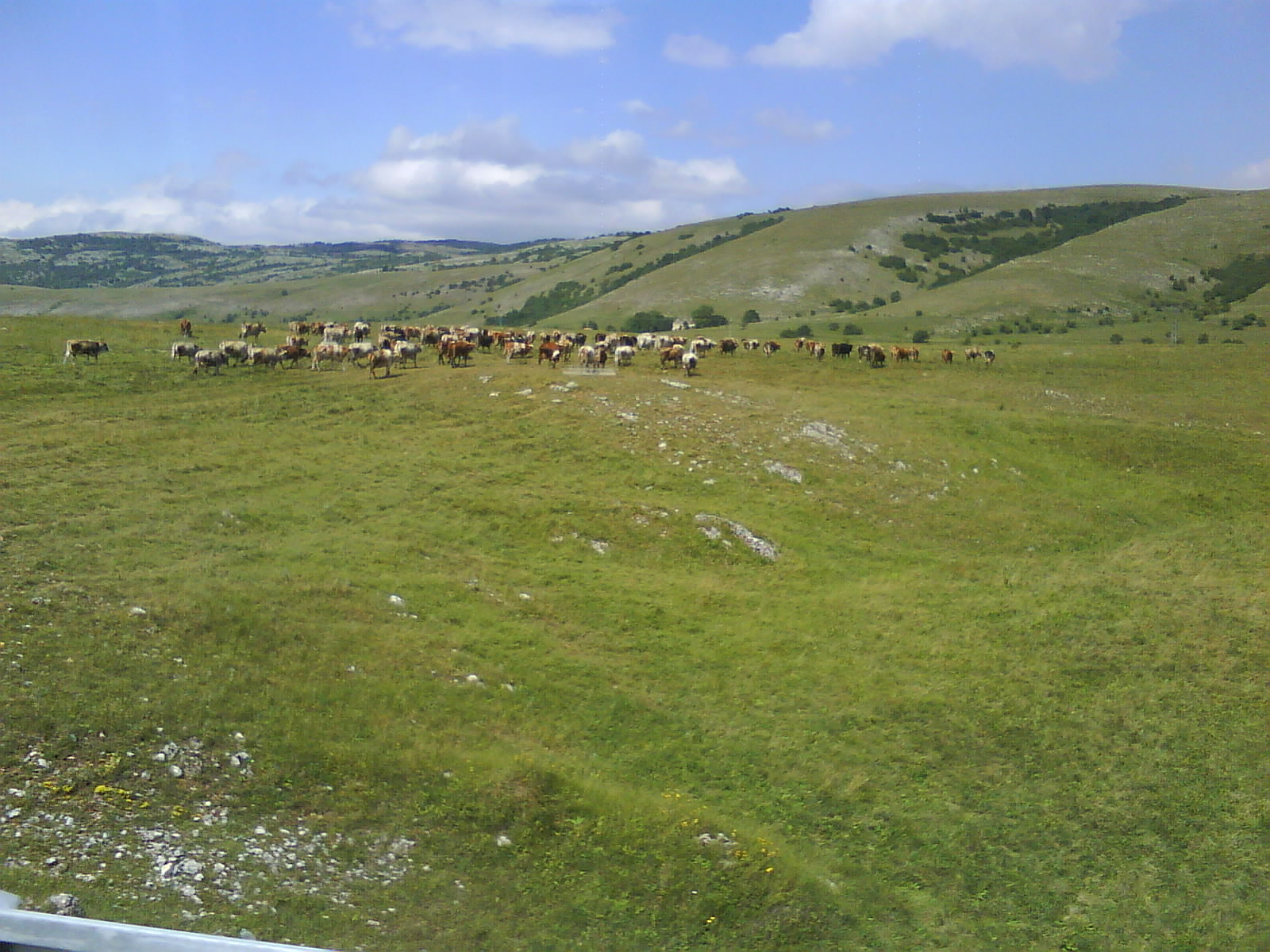 Goveda kraj Kupresa